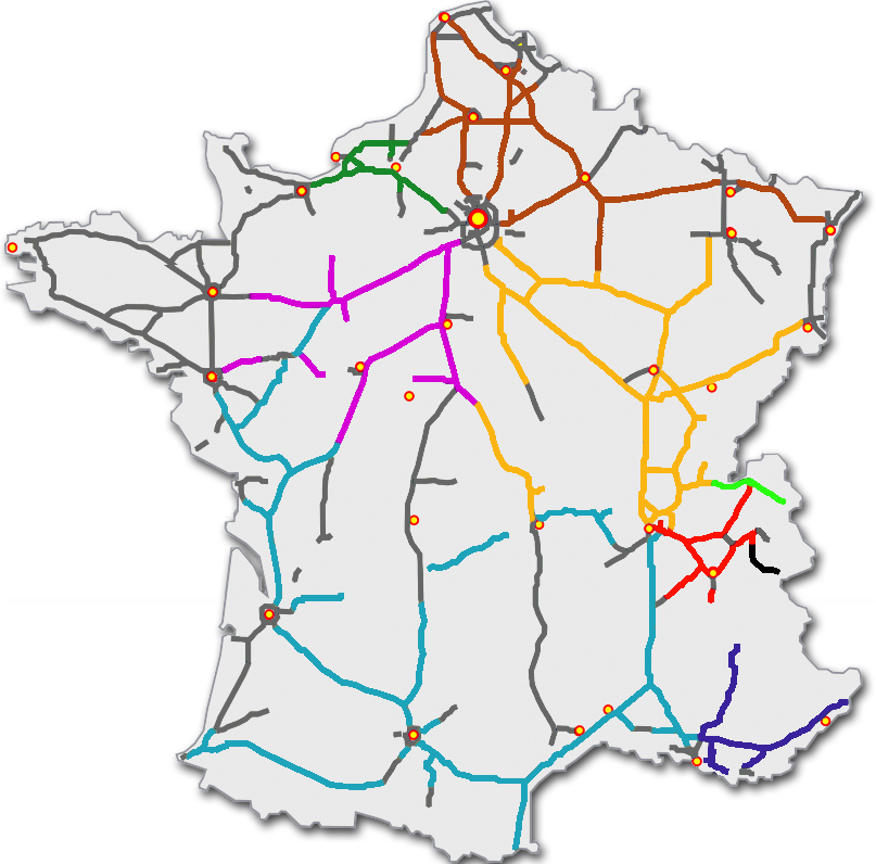 Fuente: Elaboración propia, basado en el mapa , por madcap.